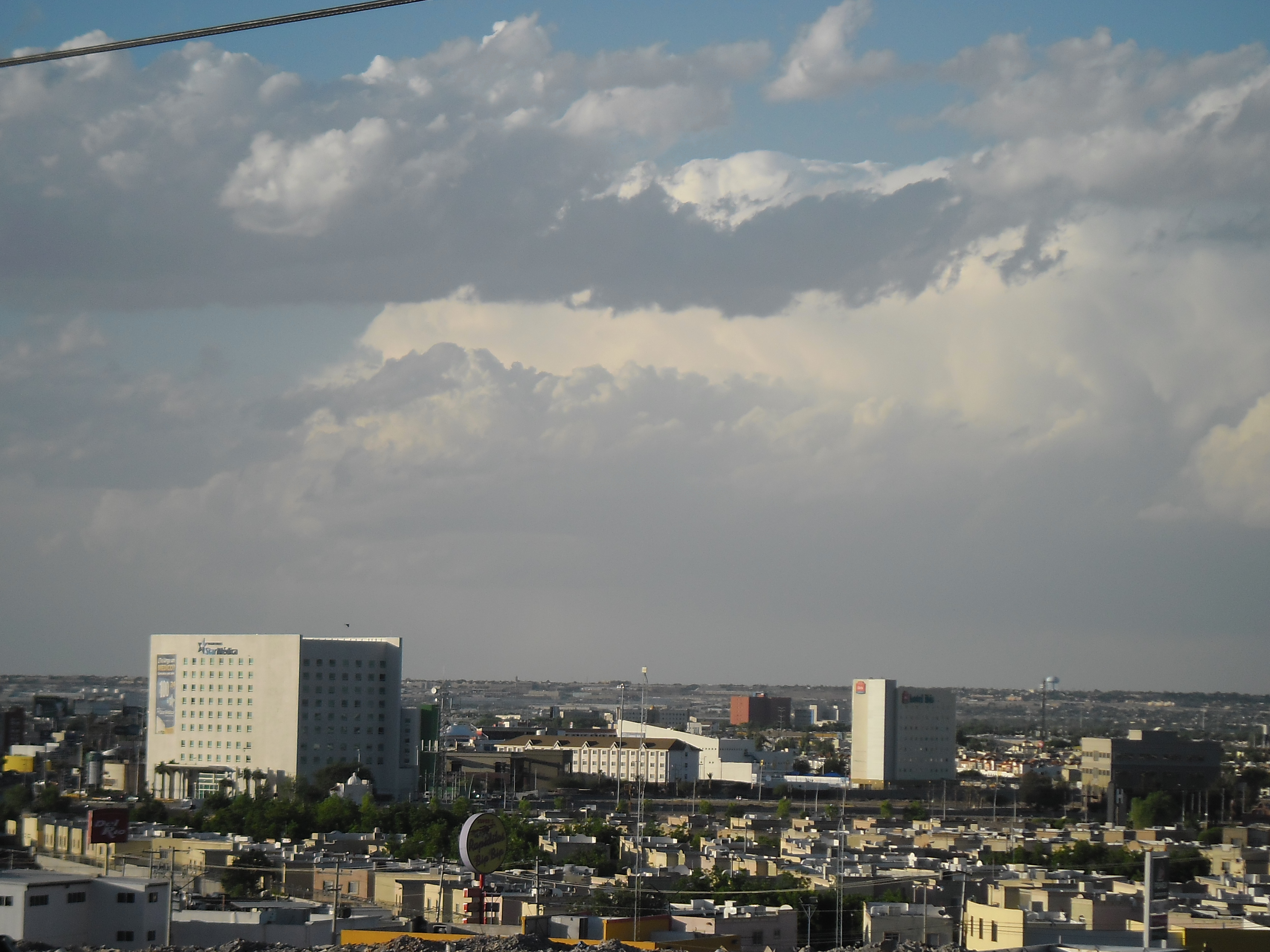 skyline